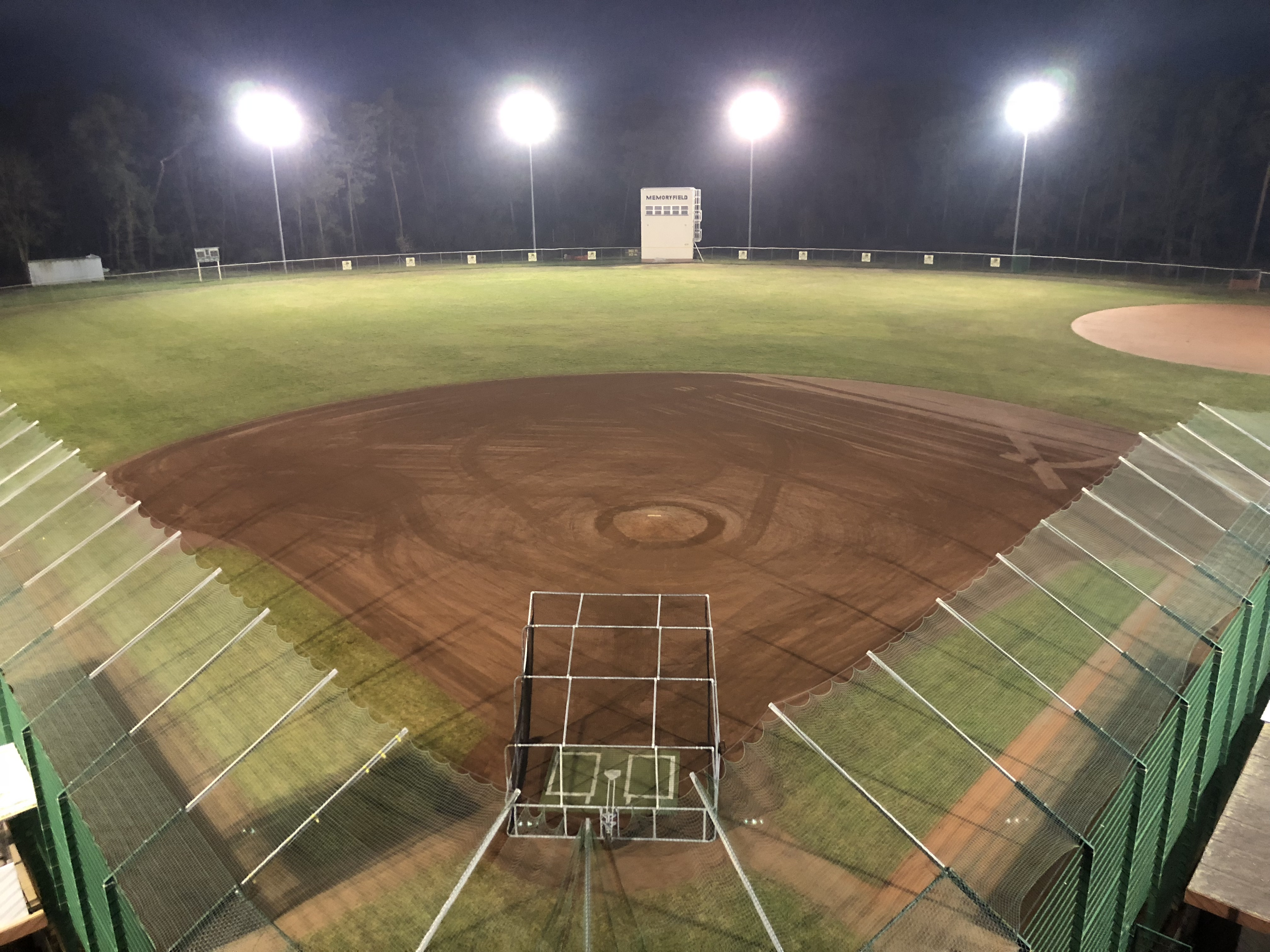 Memory-Field bei Nacht. Die Aufnahme entstand bei den Spielfeldvorbereitungsarbeiten für die Saison 2018.